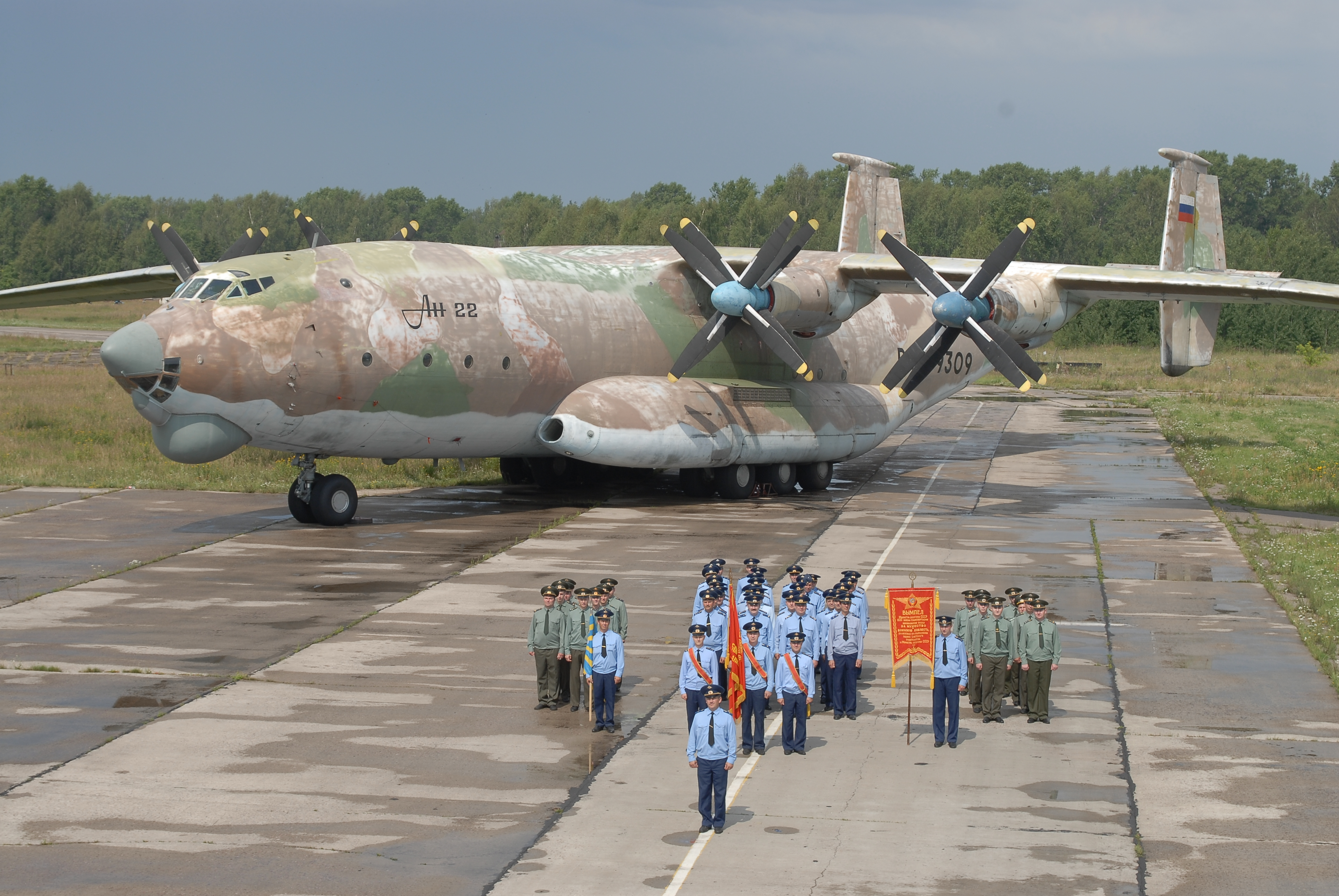 Юбилей АНТЭЙевцев.